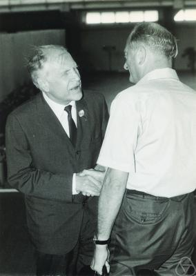 Lev Pontrjagin (left)